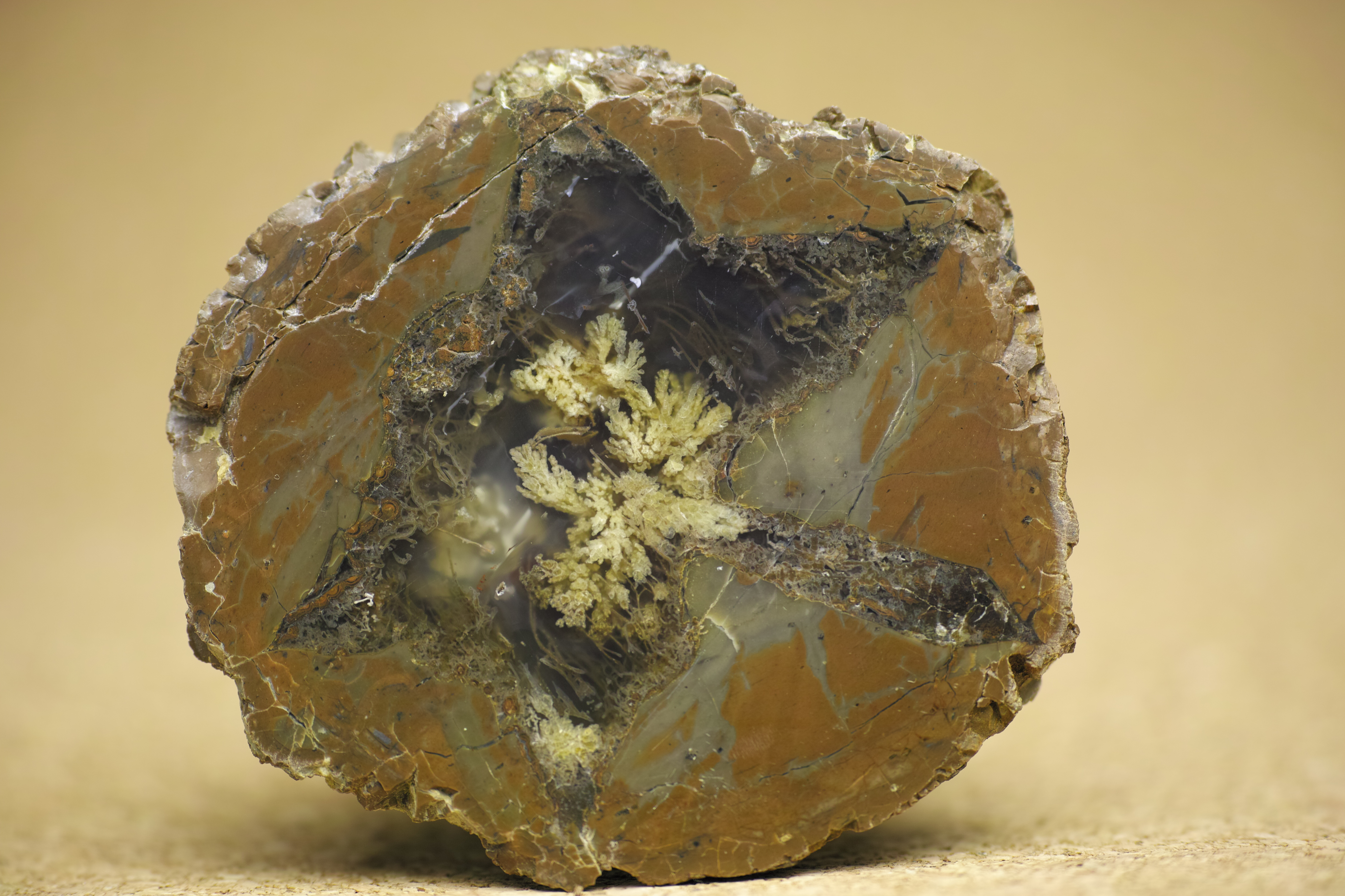 Richardson Ranch Thunder Egg with Plume from Plume Beds, Richardson Ranch, Madras, Oregon, U.S.A.